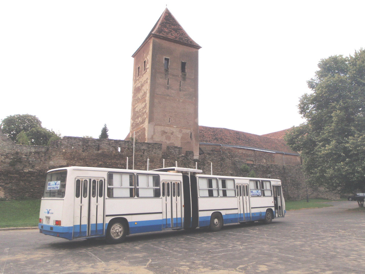 Güns Ausstellung, 60 Jahre alte Vasi Volan